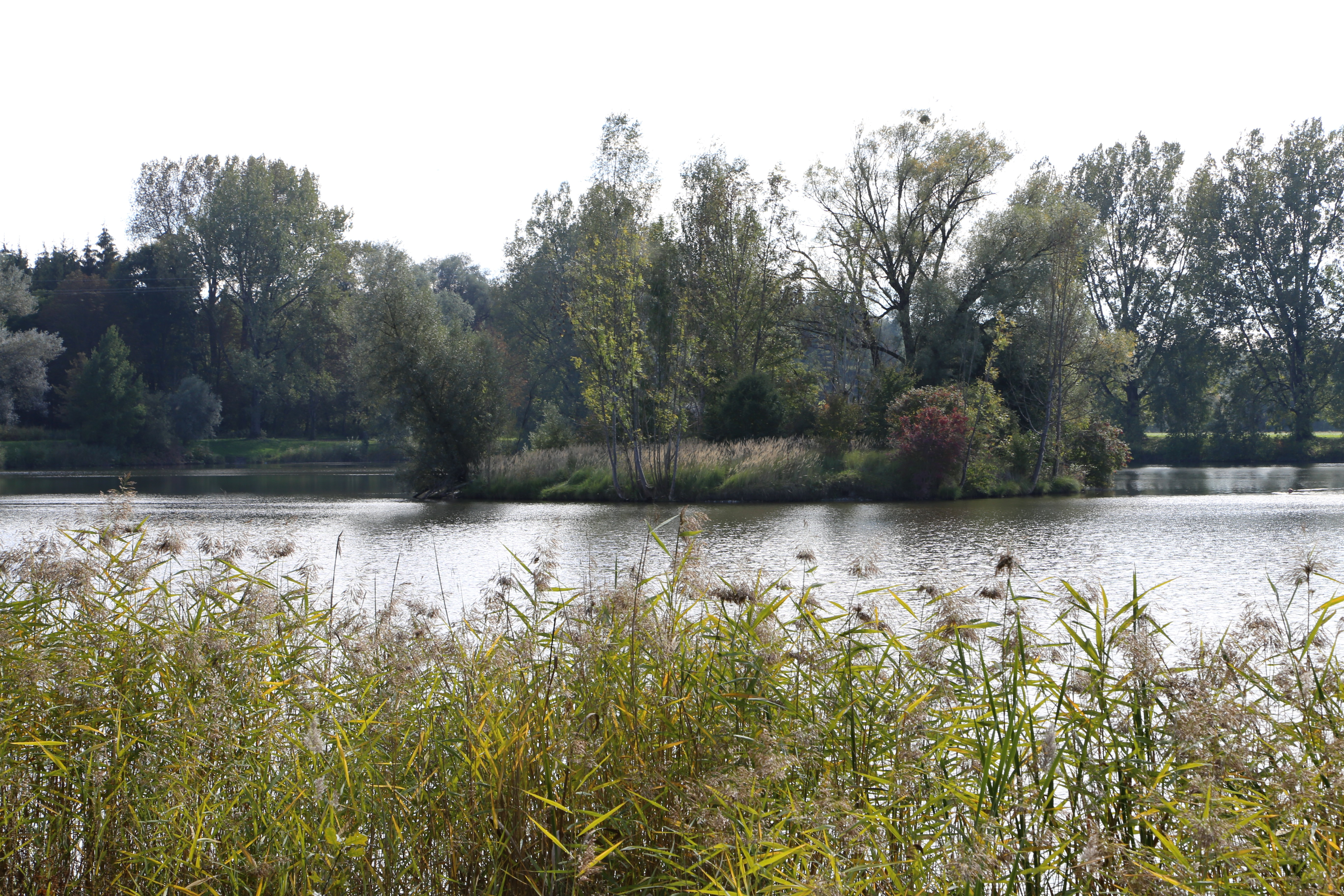 Erlensee, Schechen LSG-00535.01